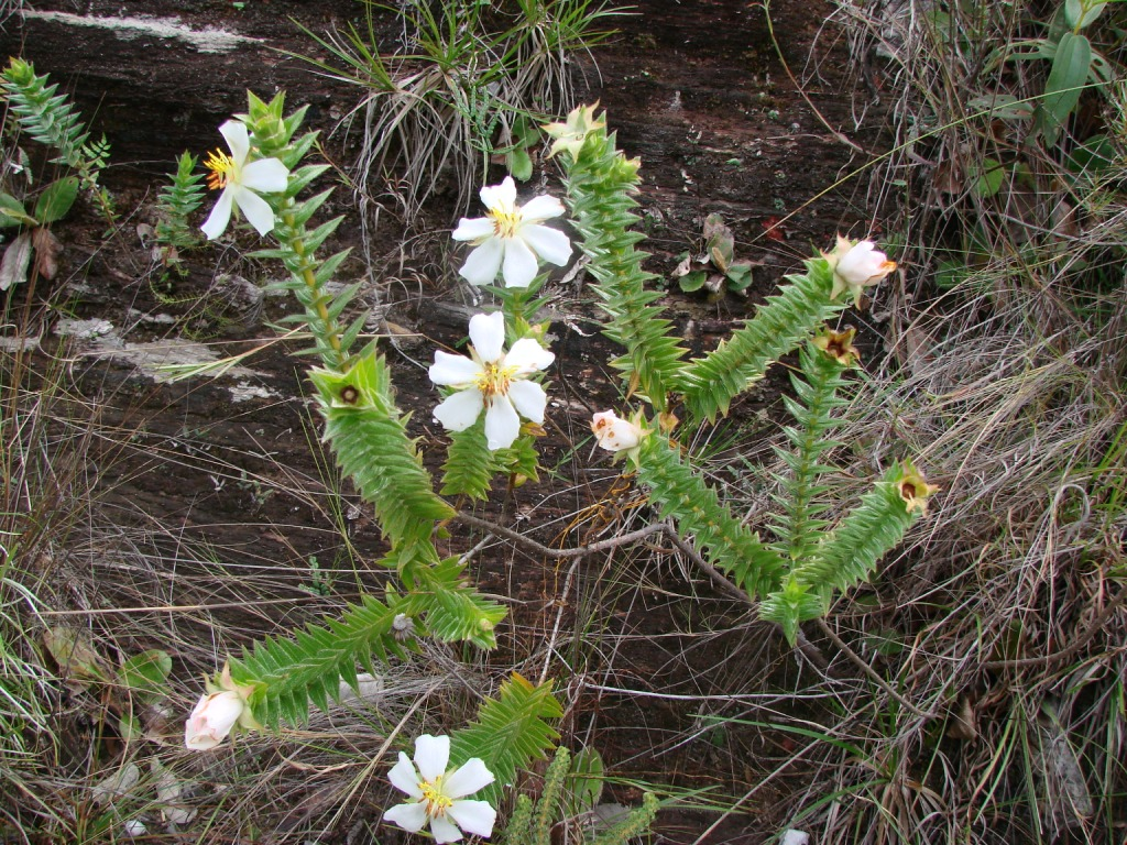 Lavoisiera fragilis - MELASTOMATACEAE Parque Estadual da Serra dos Pirineus - Pirenópolis - Goiás - Brasil.